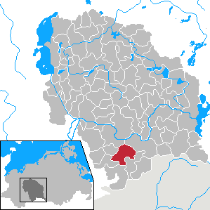 Tessenow in Mecklenburg-Vorpommern - District Parchim